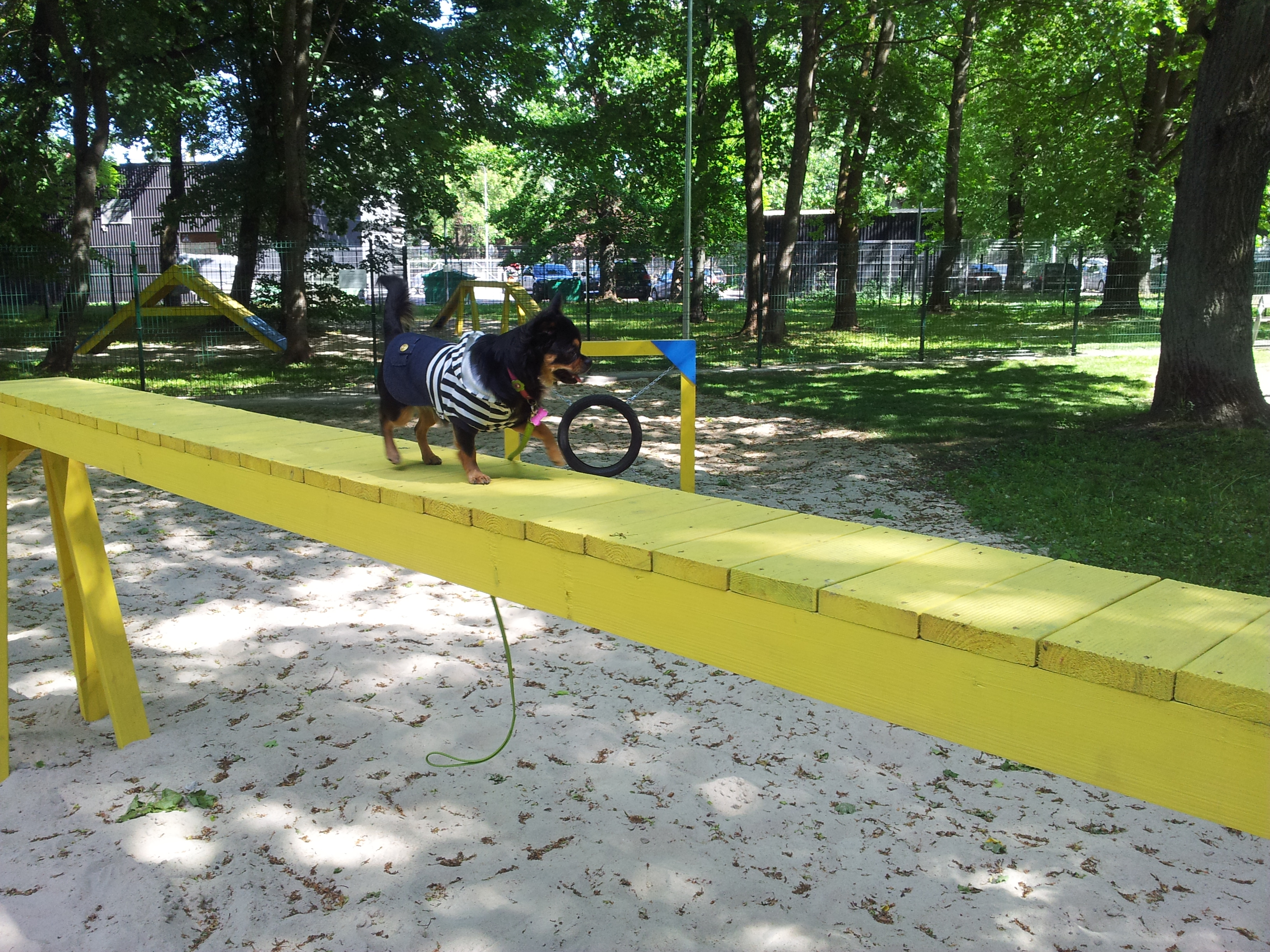 Juuni 2016 avati Cederhelmi pargis koerteväljak